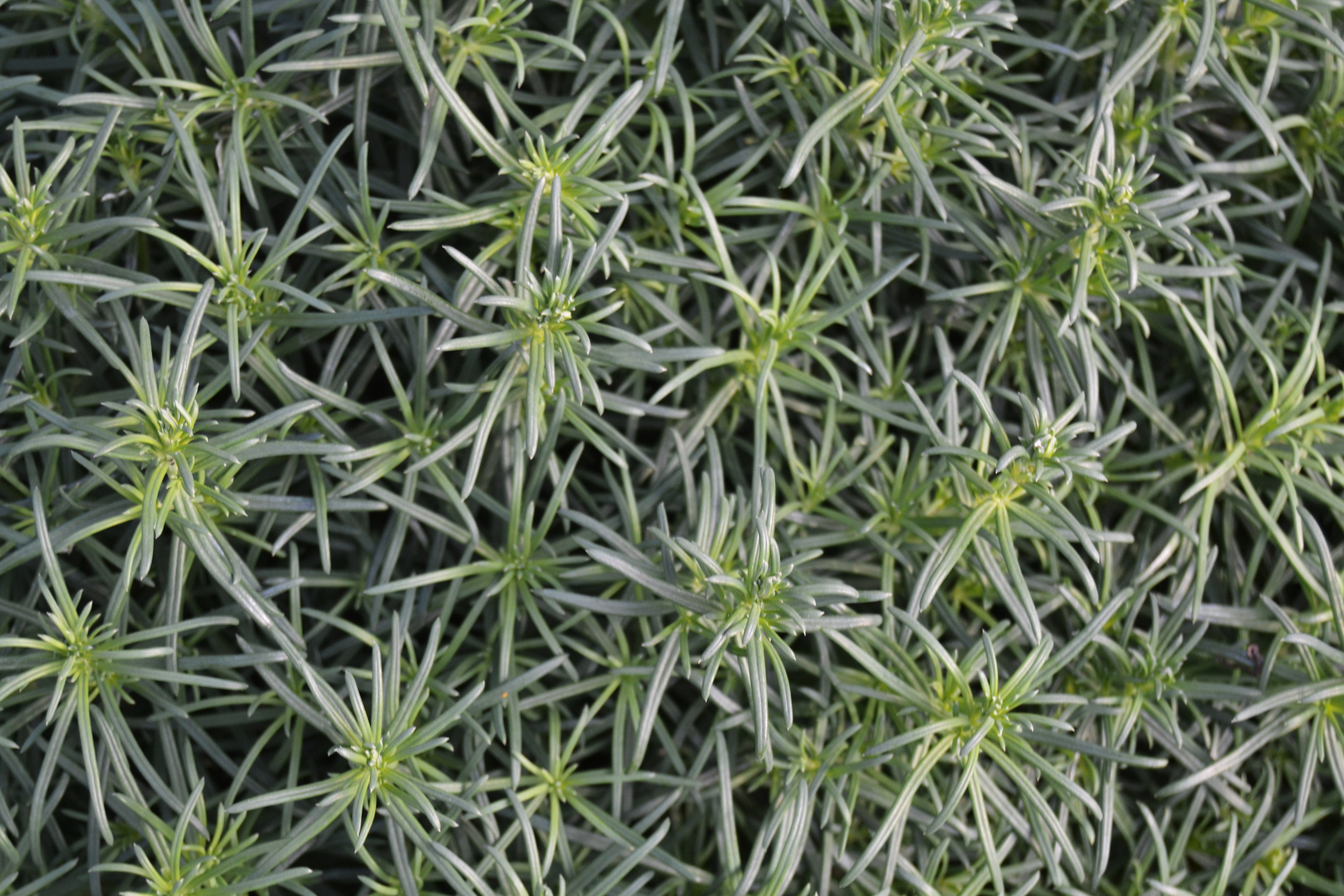 Galium friedrichii, Eivissa i Formentera, jardí botànic de València.